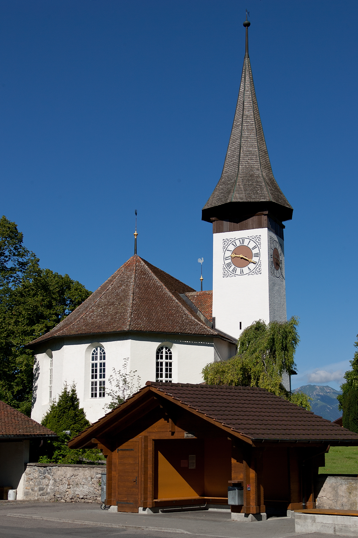 Reformierte Kirche in Sigriswil im Berner Oberland (BE)